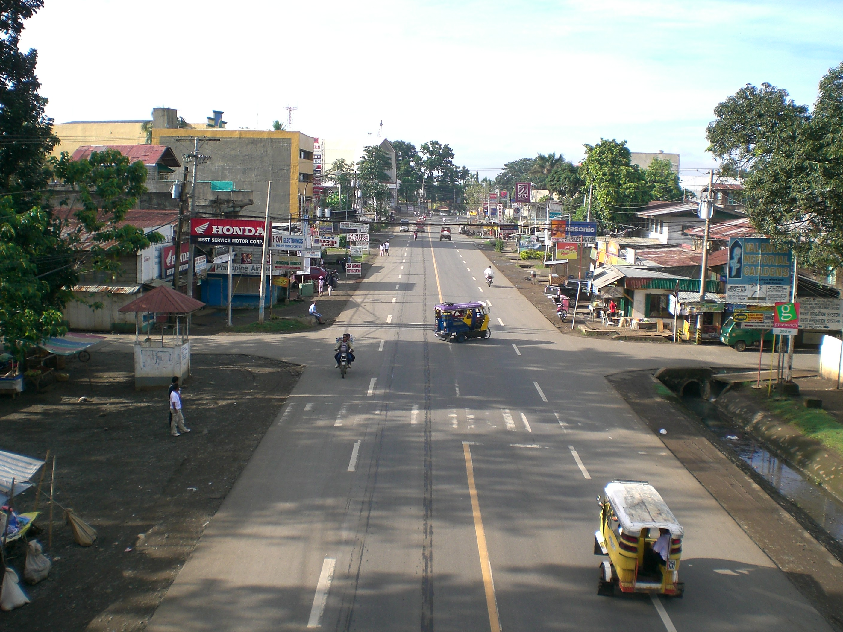 Sayre Highway going to Maramag, taken at Valencia City, Bukidnon